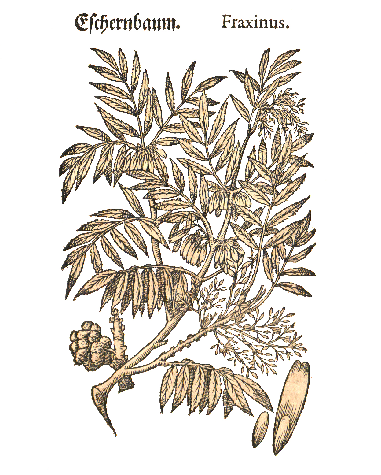 Abbildung von Fraxinus ornus